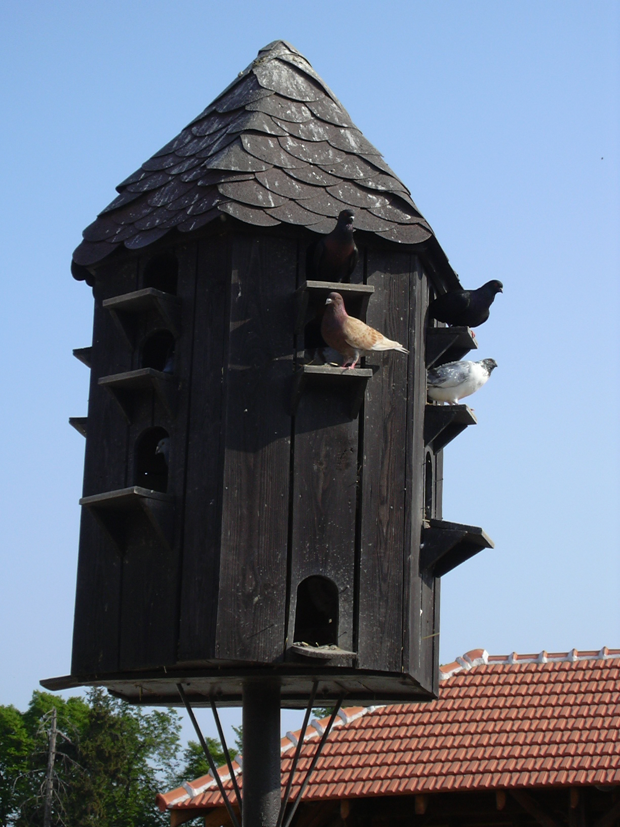 Holubník Zoo-Babiččin dvoreček (Vyškov- czech republic)